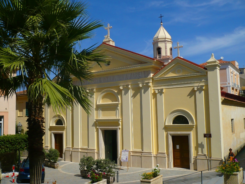 il santuario di s.maria a mare a santa maria di castellabate(salerno)